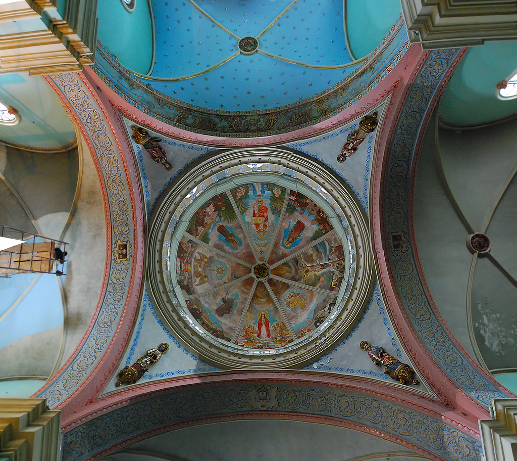 Cúpula y bóvedas de templo